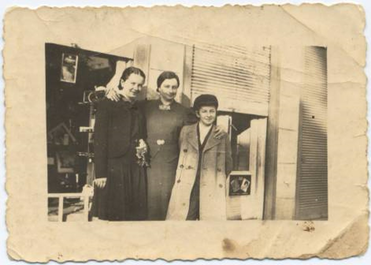 אנשי טעטש בפתח חנות הפרפומריה